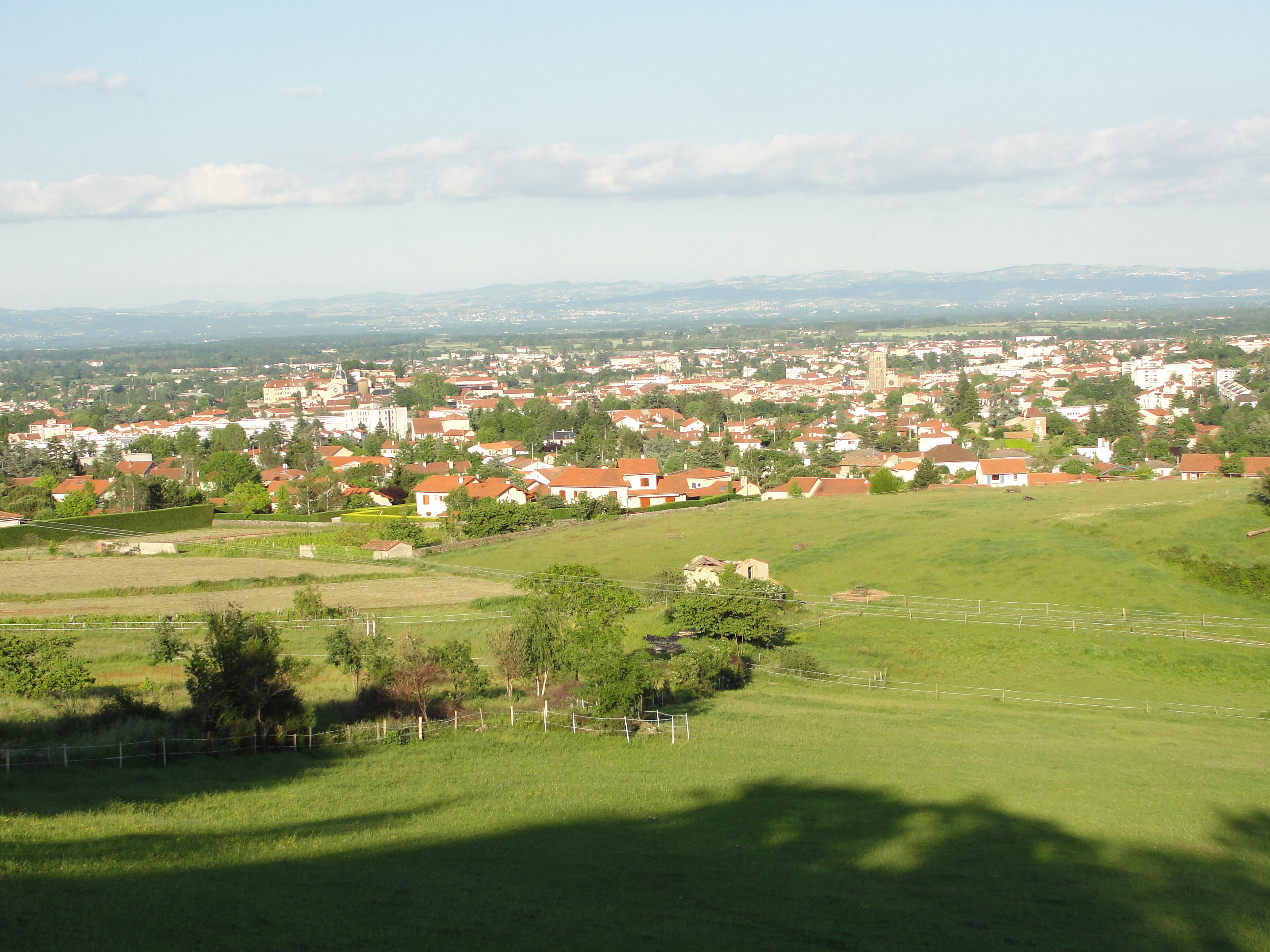 Montbrison (Loire), depuis route venant de Saint-Bonnet le Courreau.